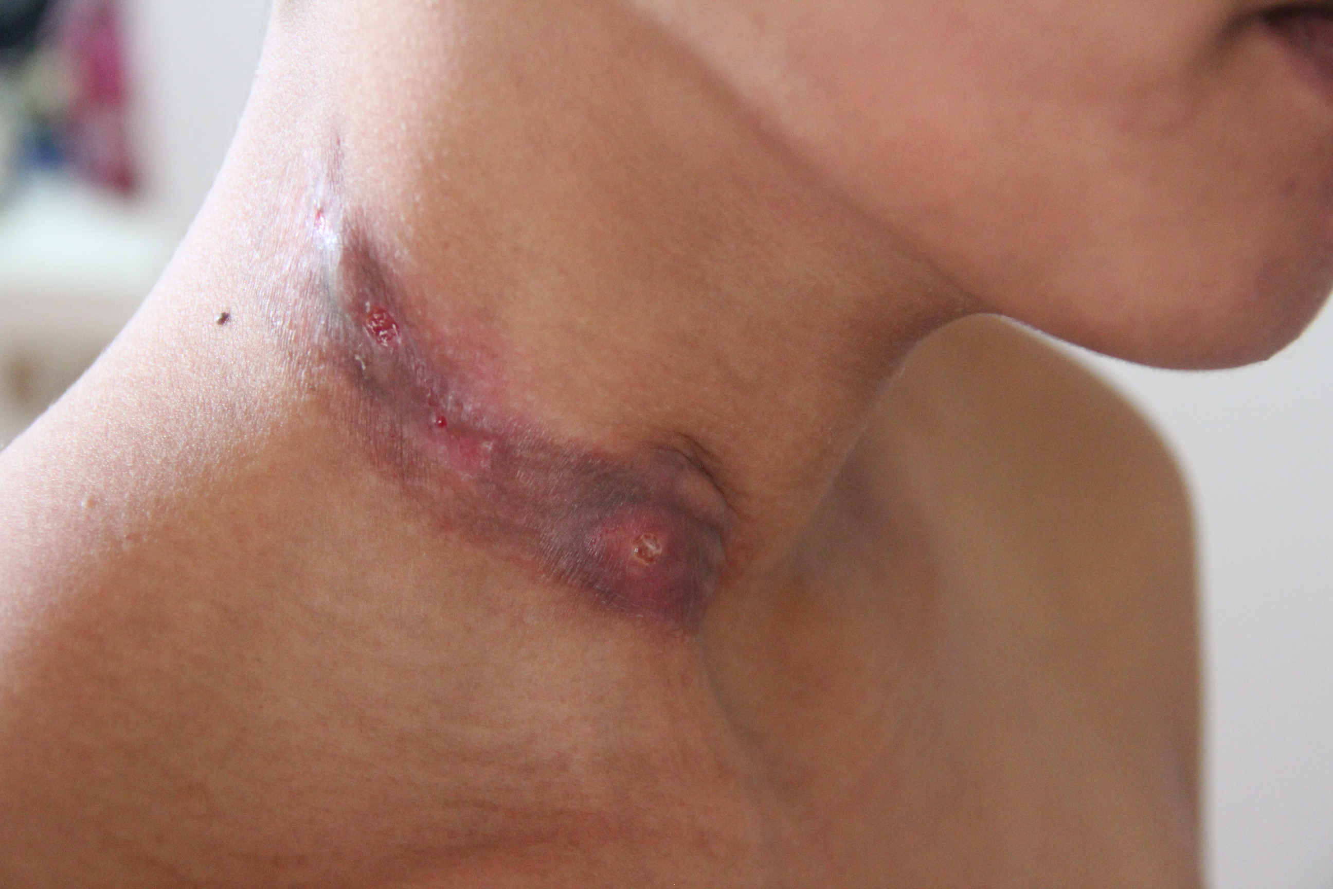 Tuberculose ganglionnaire atteignant 2 ganglions cervicales. Les 2 ganglions sont fistulisés.